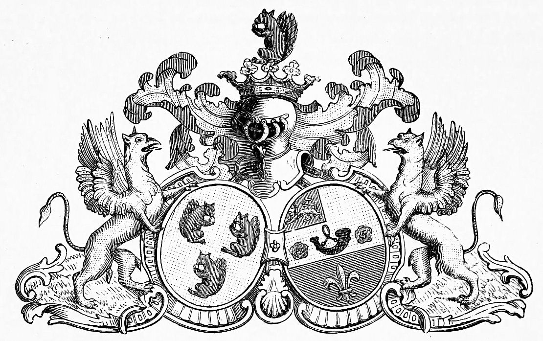 Crest of Rubens van Parys